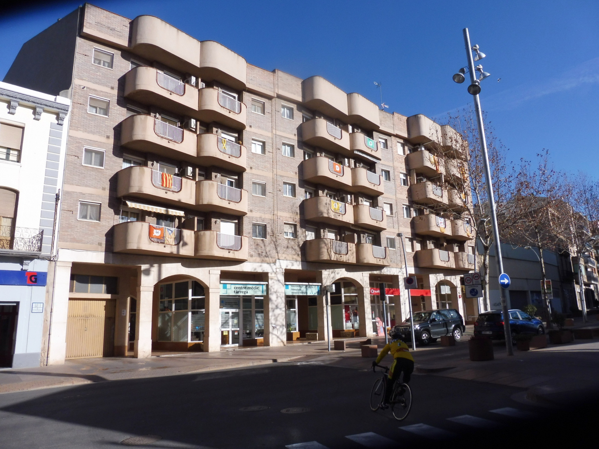 Edifici actual on hi havia el Magatzem Pont (Tàrrega)